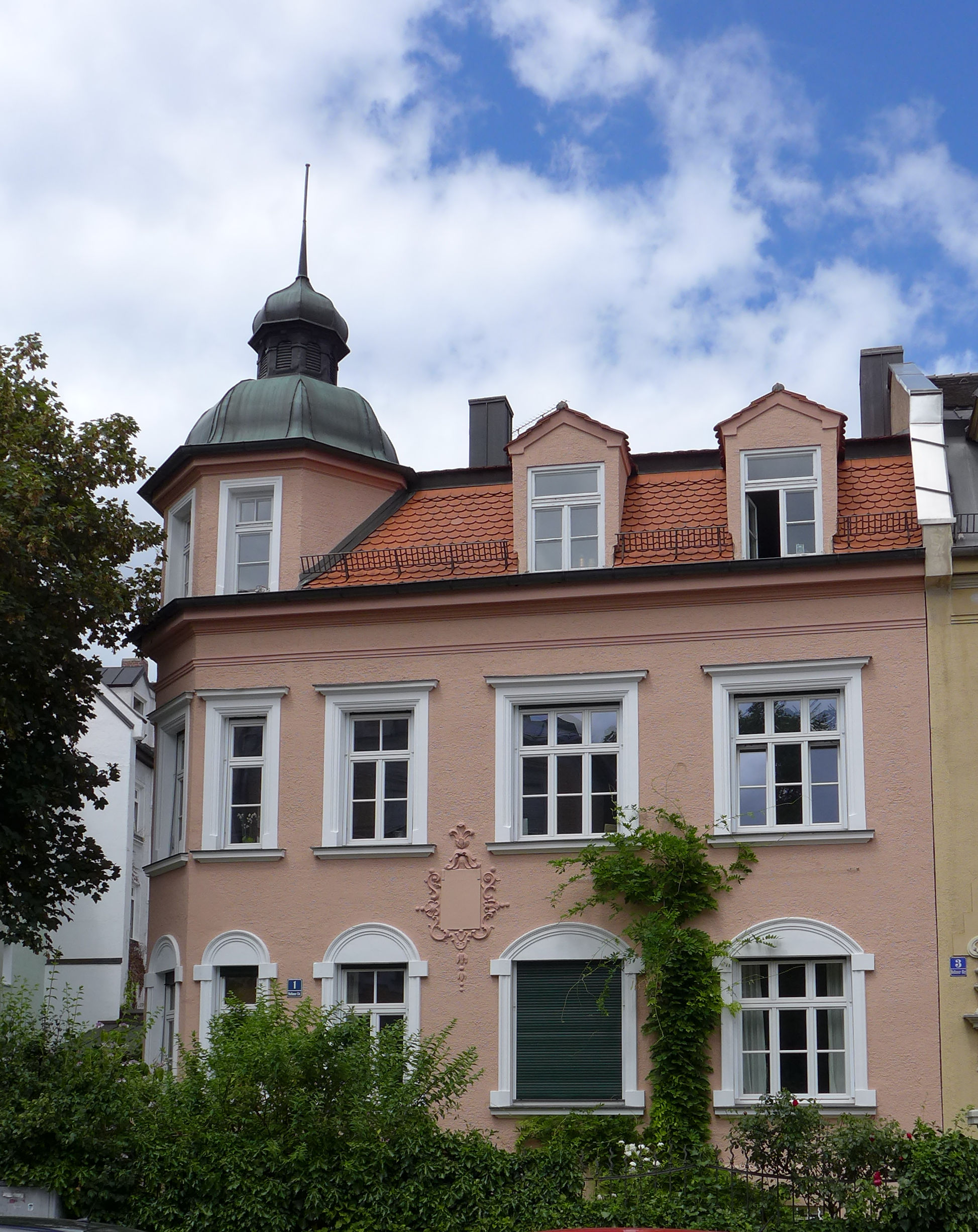 Bothmerstr. 1, München